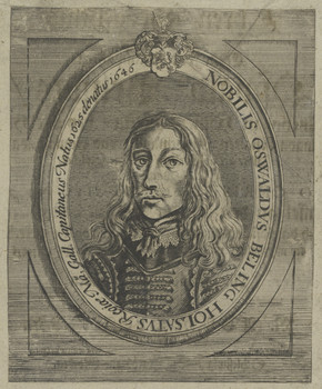 Bildnis des Oswaldvs Beling (Militär, Lebensdaten: 1625-1646). Unbekannter Künstler 1646/1750, Radierung oder Kupferstich.